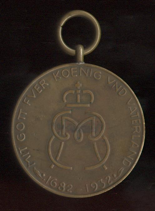 Bayern, Jubiläumsmedaille 2. Inf. Rgt. Kronprinz, 1932